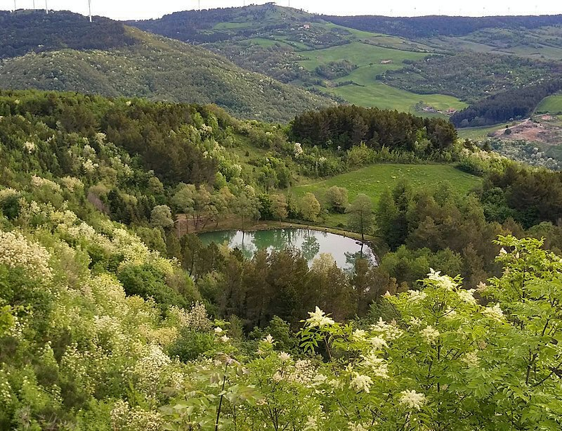 Lago Luza-Aqua-Fets in Greci (Av), osservato dal Monte Cervo